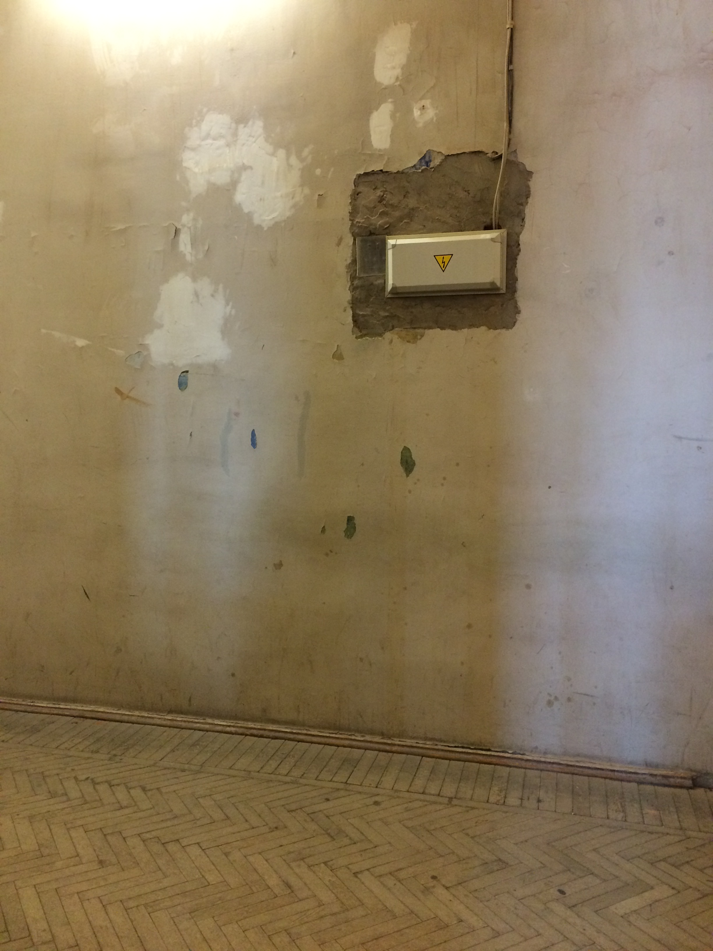 Место алтаря упраздненной церкви апостолов Петра и Павла в Михайловском замке (домовая церковь инженерного училища)